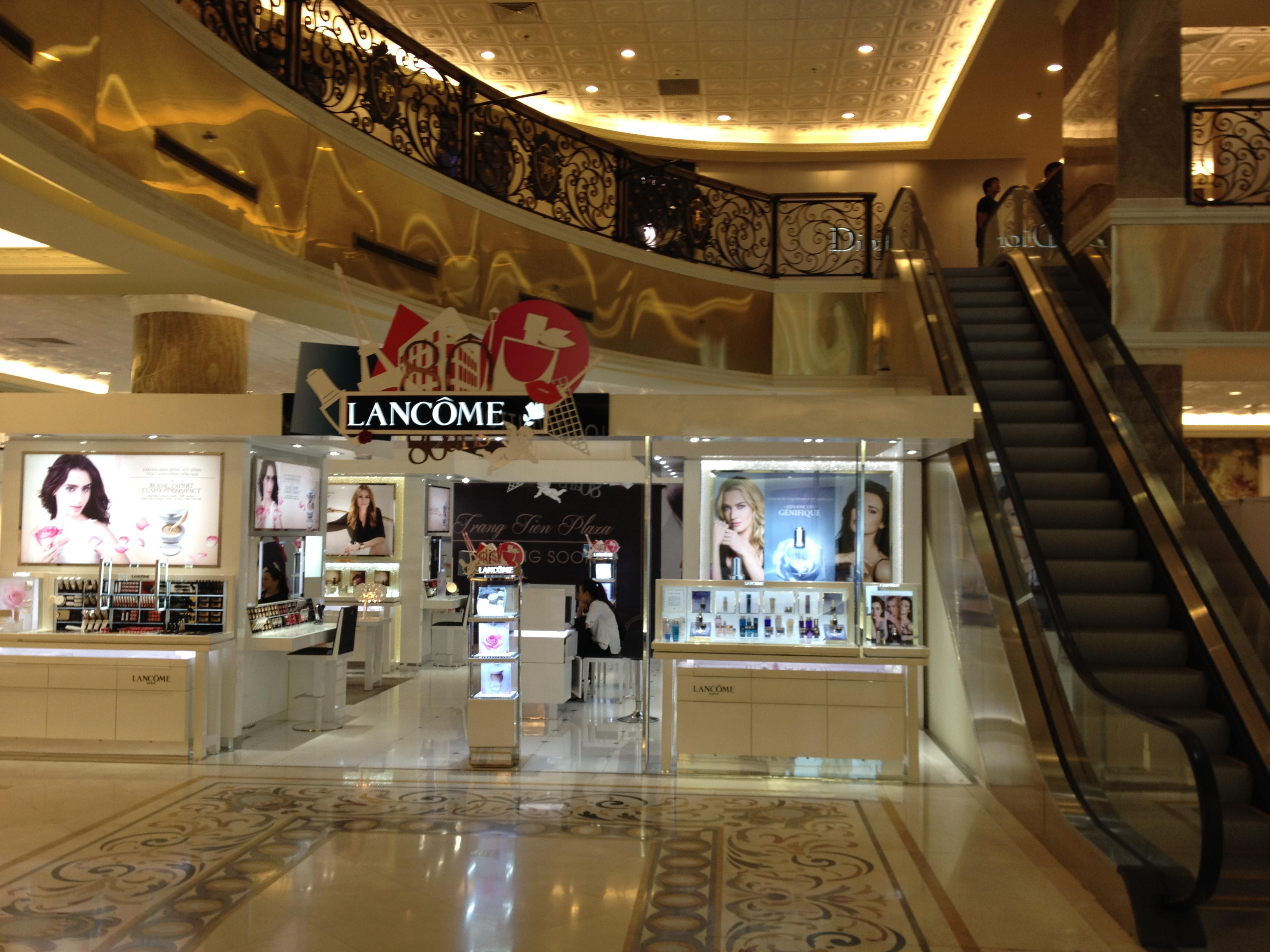 Tràng Tiền Plaza, Hà Nội, Việt Nam.